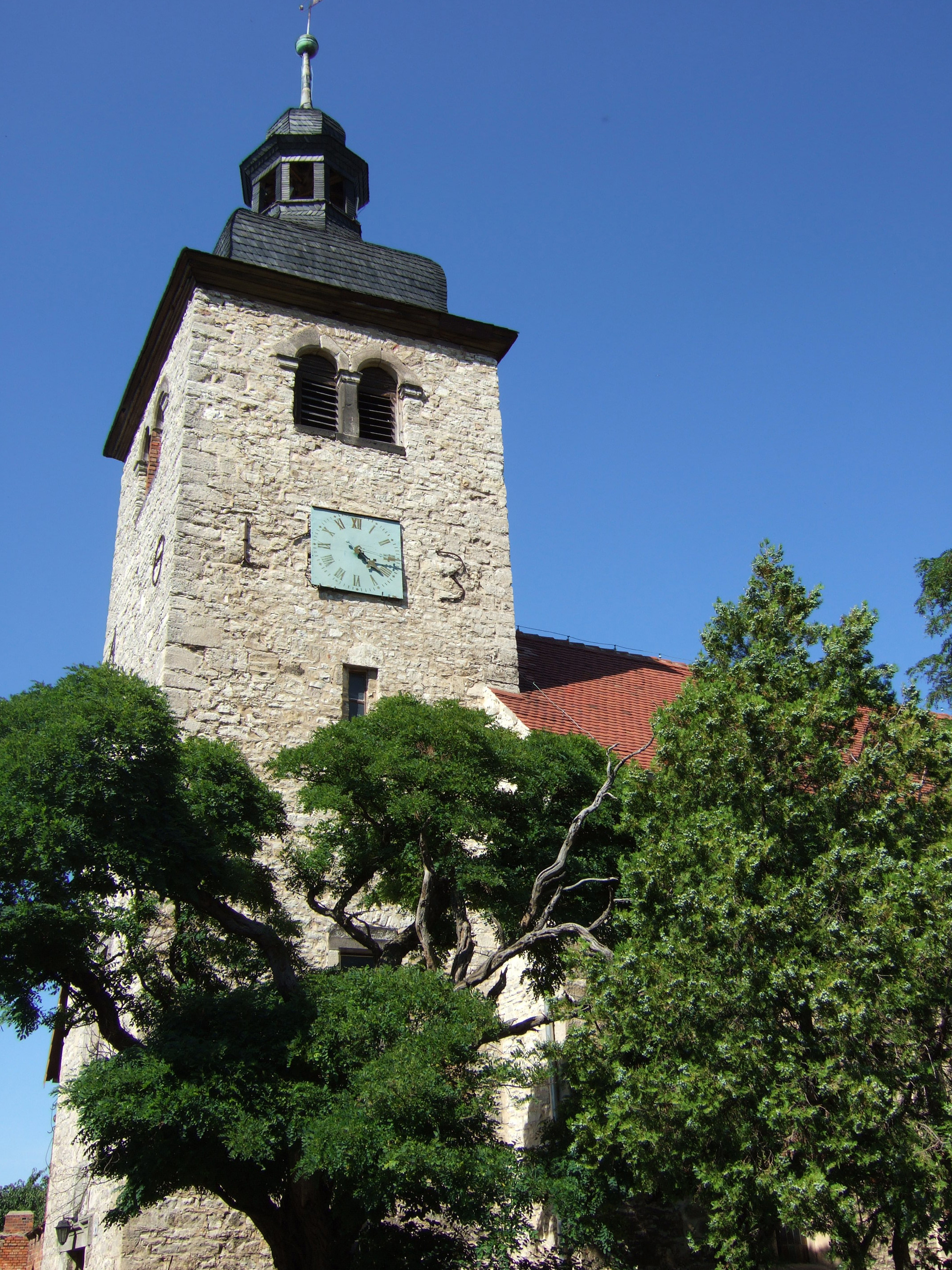 Ev. Kirche im Ortsteil Krottorf von Gröningen in Sachsen-Anhalt